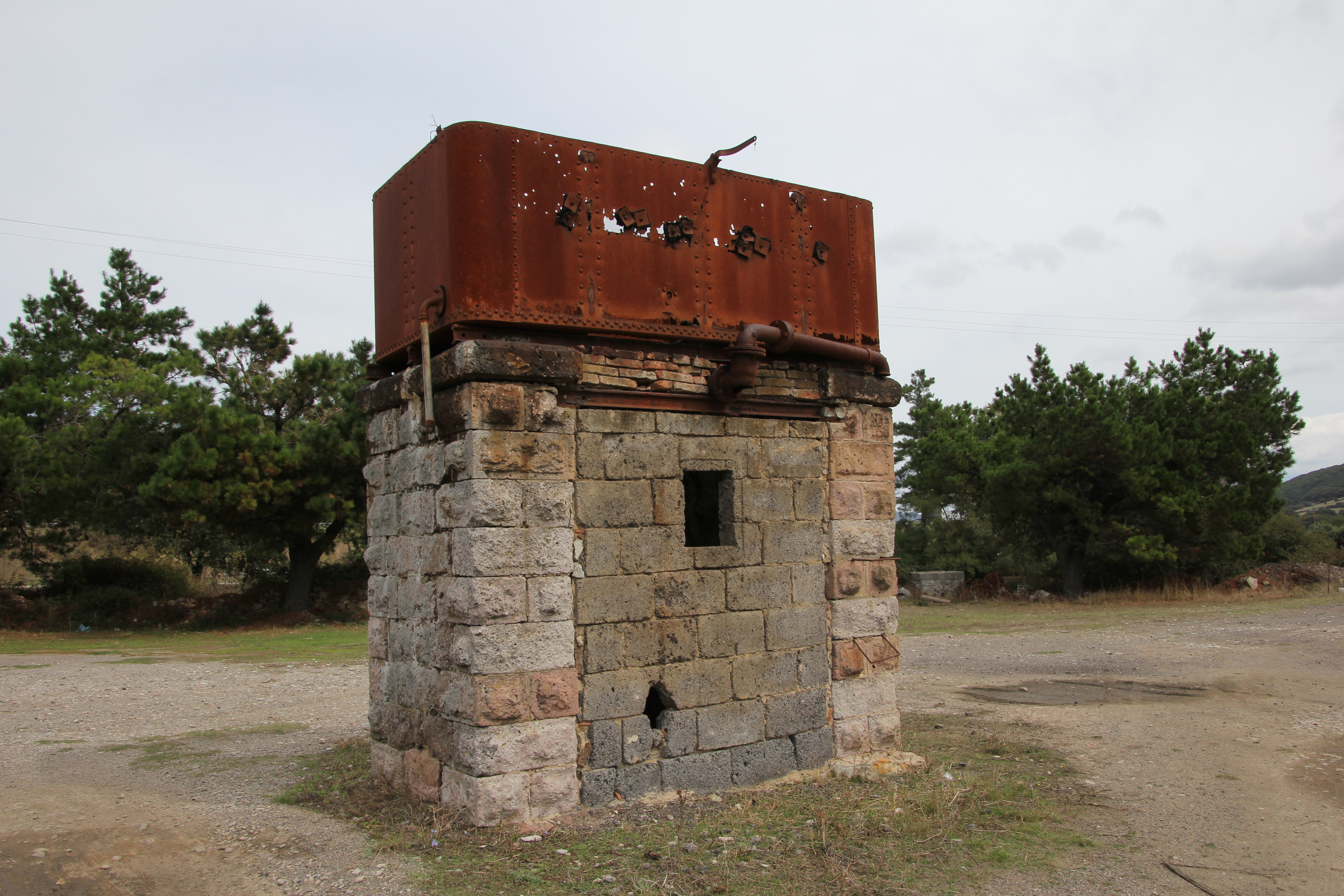 Pattada, la vecchia stazione ferroviaria